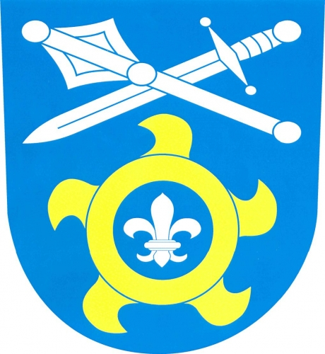 znak, Čejetice, okres Strakonice